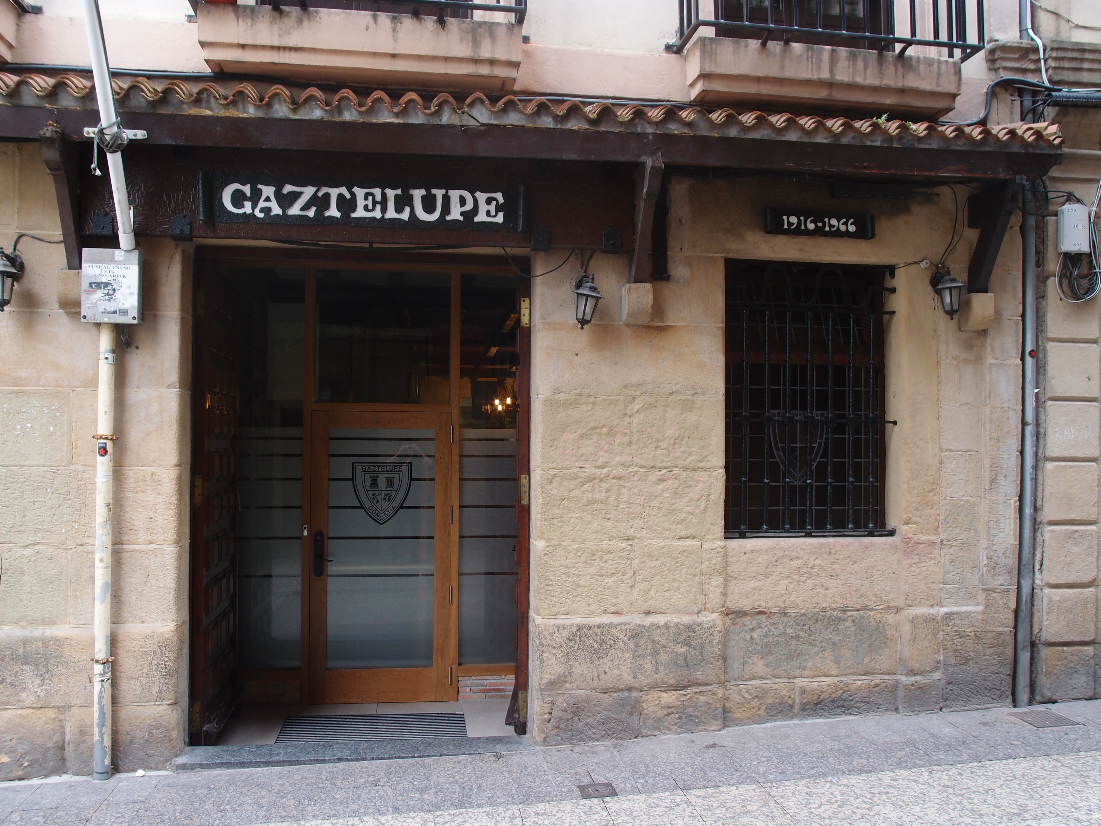 Sociedad Gastronómica "GAZTELUPE" in Donostia - San Sebastian Datum: 11.05.2014 Urheber: M. Pfeiffer alias Gordito1869 Quelle: Privates Fotoarchiv des Urhebers